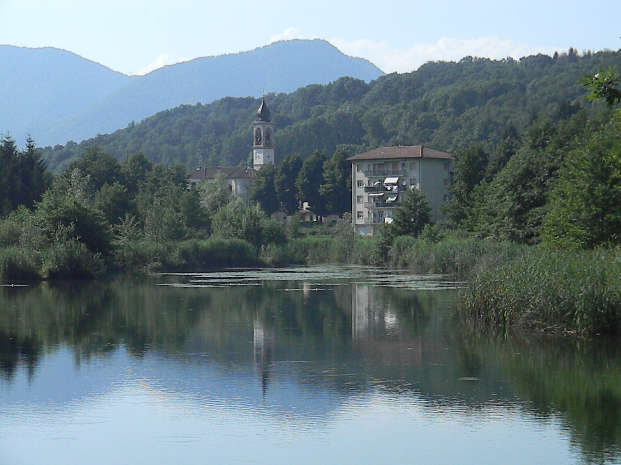 Brinzio visto dal lago